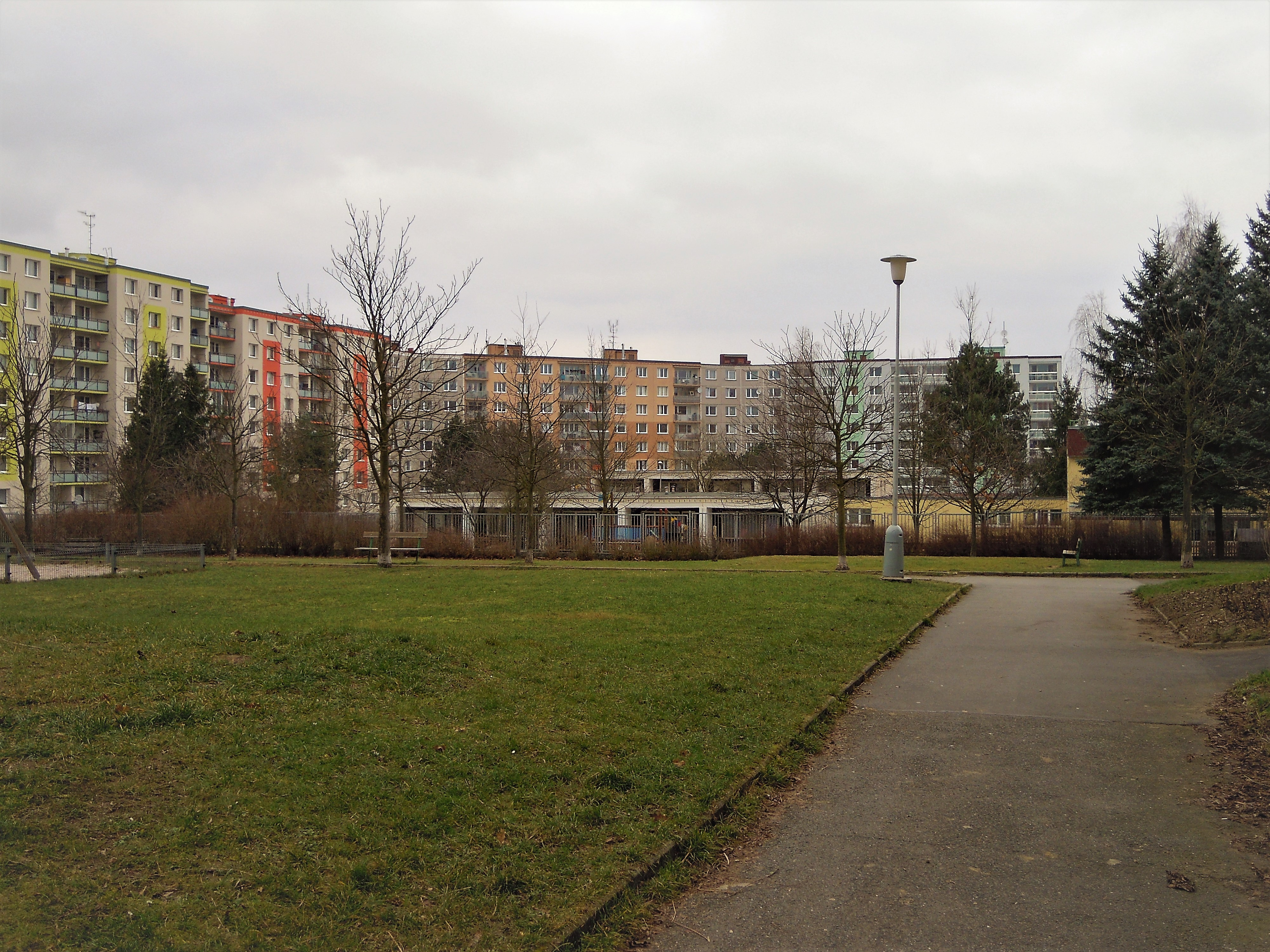 Panelové sídliště Košutka, Manětínská ulice